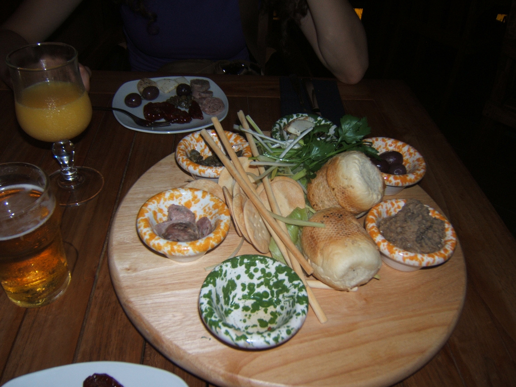 Piatto tipico maltese formato da: salsiccia, olive sotto sale, pomodori soleggiati, capperi, formaggio tipico, pane e grissini tipici, tutto tipico.... e inoltre... la Bigilla, la coppetta piu' a destra formata da crema di piselli e aglio mi pare. Bevande: Miranda! (l'equivalente della Fanta... liofilizzata) e Birra Cisk (bionda leggera, sciacquata!)